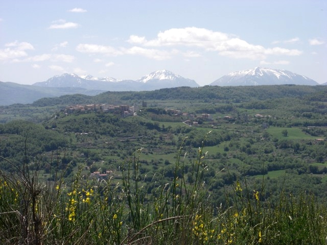 Teana, petit village de Basilicate (Italie du Sud), dans le Parc national du Pollino